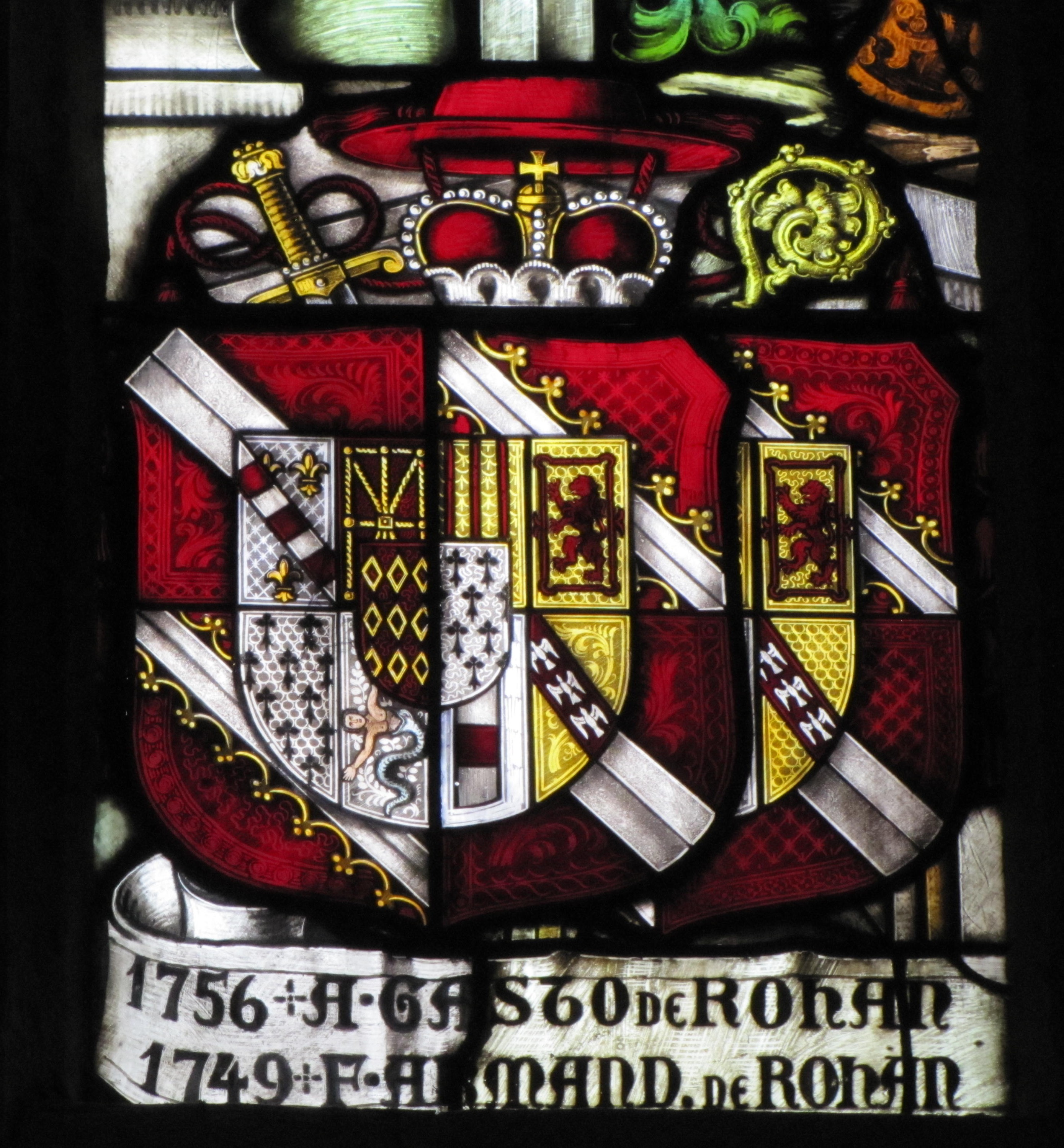 Alsace, Bas-Rhin, Saverne, Église Notre-Dame-de-la-Nativité (PA00084954, IA00055464). Verrière à personnages du chœur (Ott Frères, 1925): Blason des évêques de Strasbourg Armand Gaston de Rohan Soubise (1704-1749) et François Armand de Rohan Soubise (1749-1756).